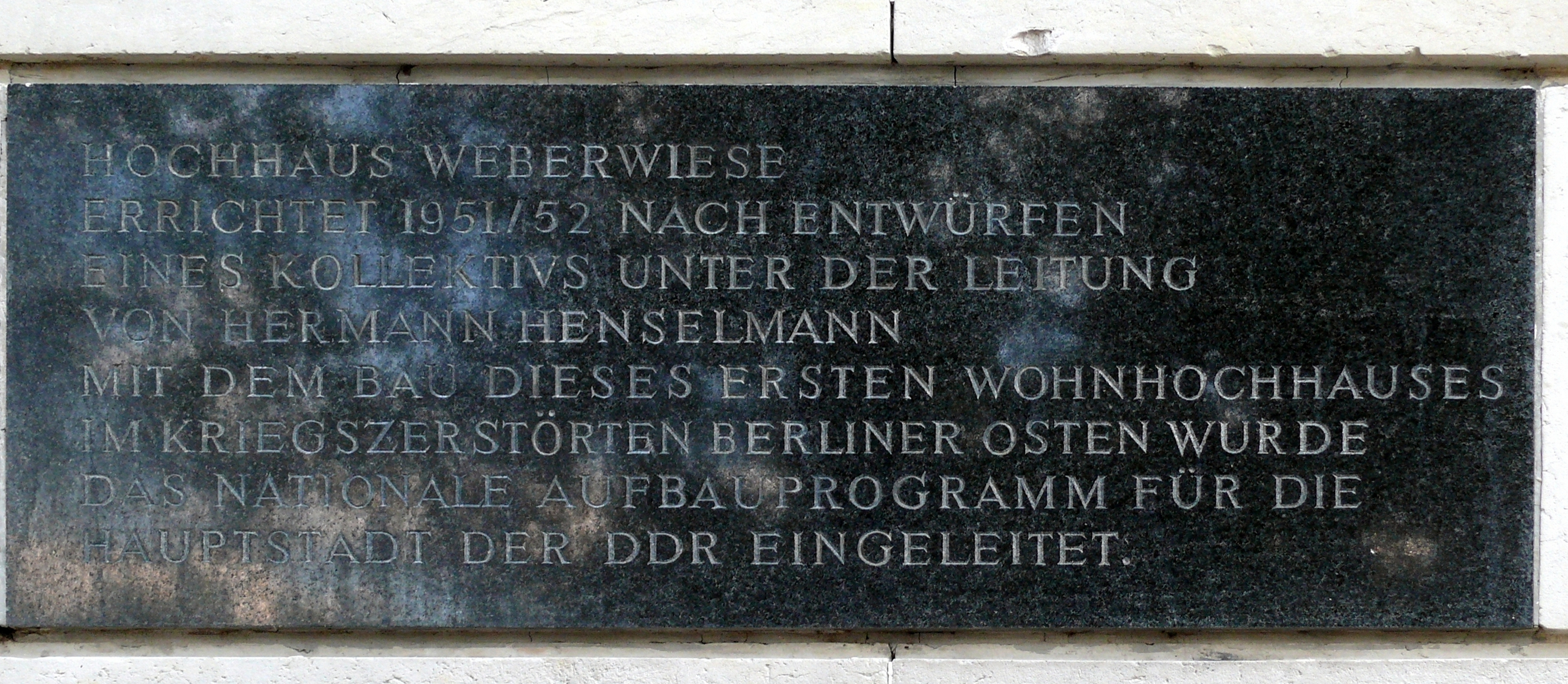 Berlin-Friedrichshain Hochhaus an der Weberwiese Gedenktafel. “Hochhaus Weberwiese Errichtet 1951/52 nach Entwürfen eines Kollektivs unter der Leitung von Hermann Henselmann Mit dem Bau dieses ersten Wohnhochhauses im kriegszerstörten Berliner Osten wurde das nationale Aufbauprogramm für die Hauptstadt der DDR eingeleitet.”